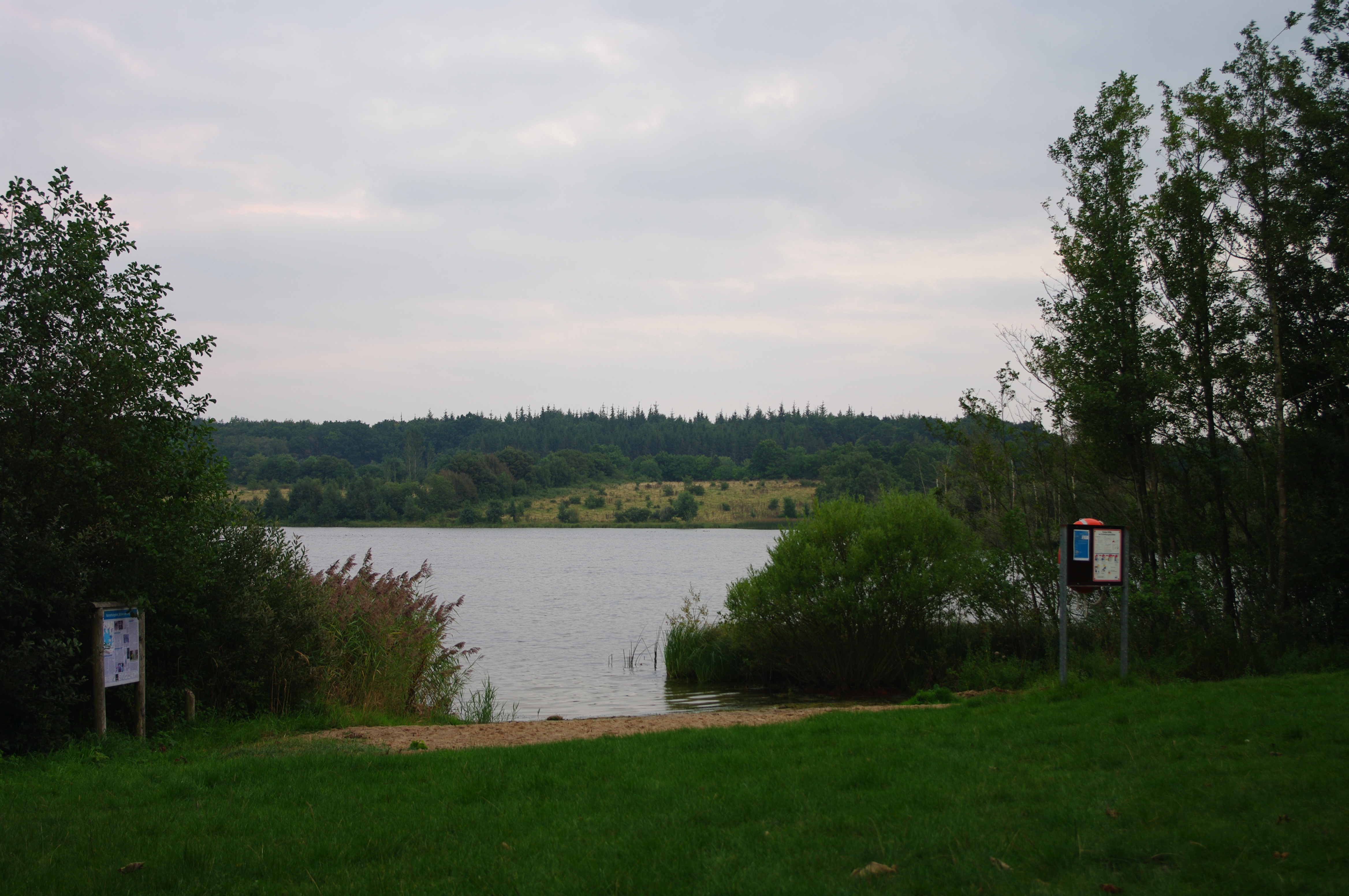 Die Wasserfläche des Bültsees von Westen gesehen